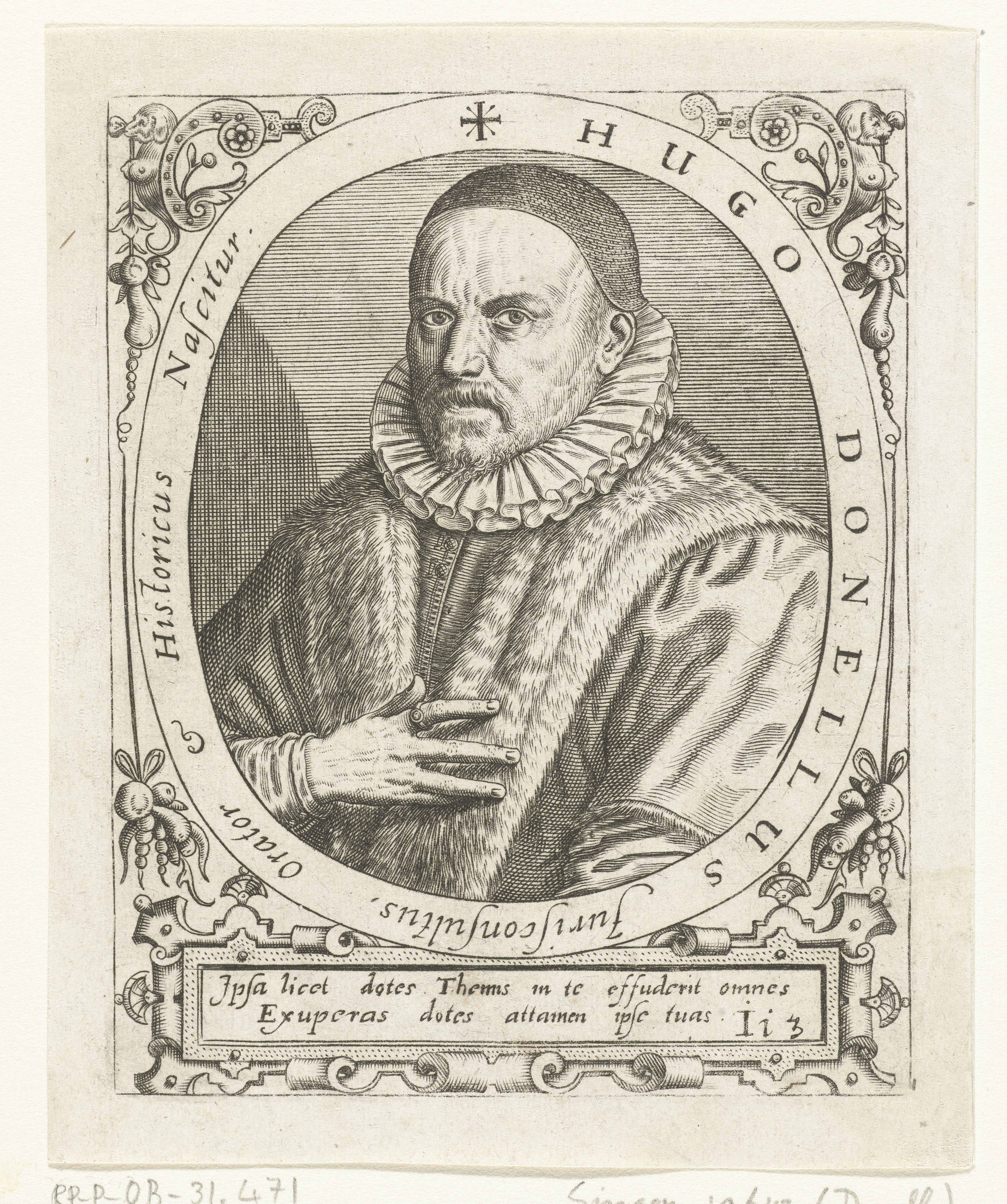 IdentificatieTitel(s): Portret van Hugues DoneauHugo Donellus (titel op object)Objecttype: prent boekillustratie Objectnummer: RP-P-OB-31.471Catalogusreferentie: Singer 19643Opschriften / Merken: verzamelaarsmerk, verso, gestempeld: Lugt 2228Omschrijving: Portret van de jurist Hugues Doneau, in ovaal met randschrift. Onder het portret een cartouche met Latijns vers.VervaardigingVervaardiger: prentmaker: Theodor de Bryprentmaker: Johann Theodor de Brynaar ontwerp van: Jean Jacques Boissard (mogelijk)Plaats vervaardiging: Frankfurt am MainDatering: ca. 1597 - ca. 1599 en/of 1669Fysieke kenmerken: gravureMateriaal: papier Techniek: graveren (drukprocedé)Afmetingen: plaatrand: h 140 mm × b 100 mmToelichtingGemaakt voor: J.J. Boissard, Icones virorum illustrium doctrina &c eruditione praestanti um contines. Frankfurt am Main: de Bry, 1597-1599. Opnieuw gebruikt in: J.J.Boissard, Bibliotheca chalcographica, hoc est Virtute et eruditione clarorum Virorum Imagines. Heidelberg: Clemens Ammon, 1669. Dl. 1-5 (te herkennen aan de toegevoegde signatuur in de rechter onderhoek: 2I3).OnderwerpWie: Hugo DonellusVerwerving en rechtenVerwerving: onbekendCopyright: Publiek domein